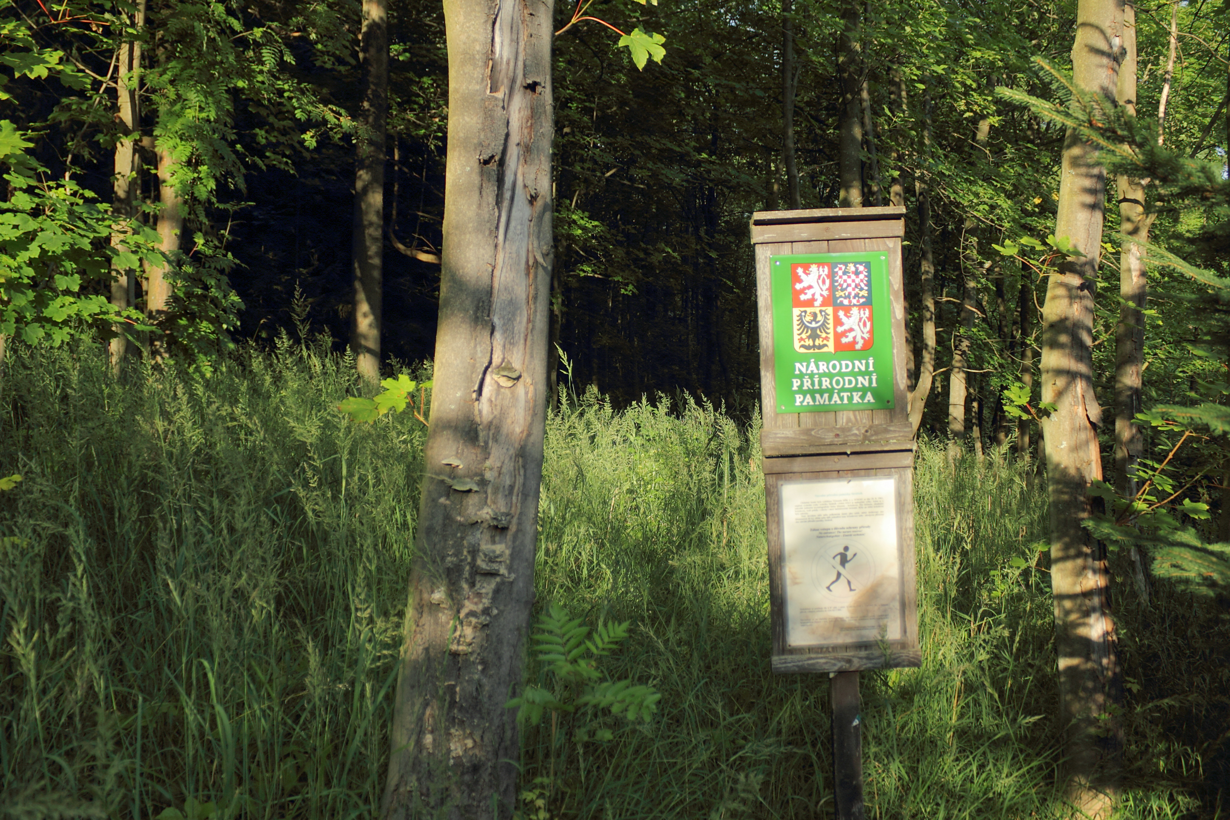 NPP Strážník